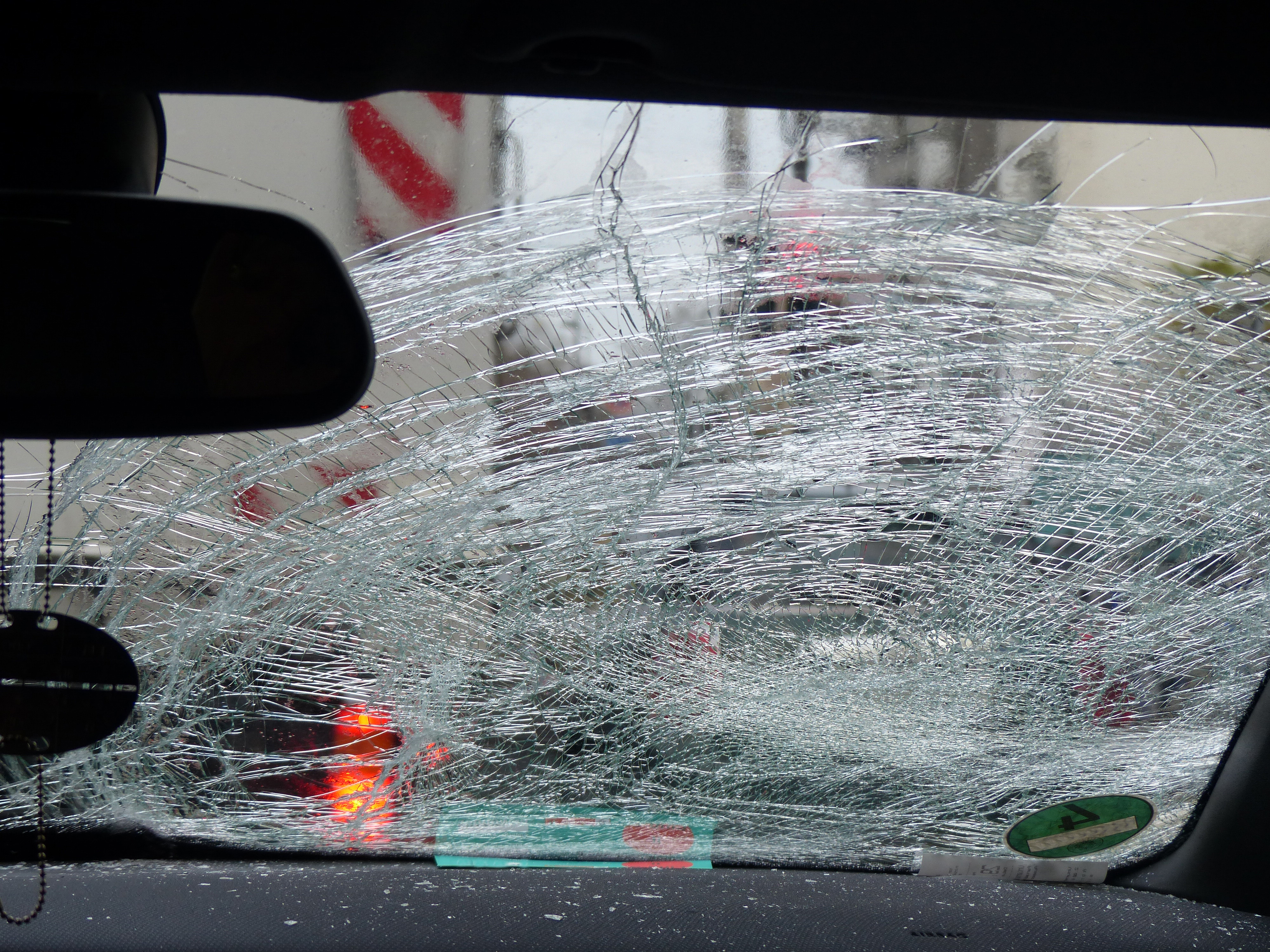 Sicherheitsverbundglas einer Windschutzscheibe nach Einschlag einer losgelösten Eisplatte von einem LKW-Auflieger.